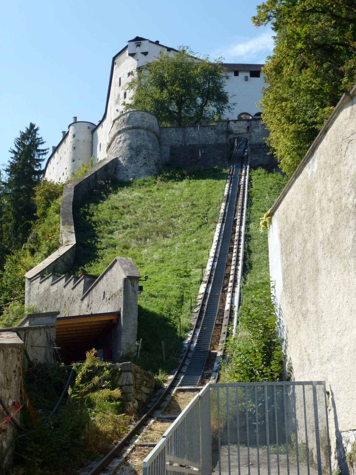 Reiszugtrasse von der Talstation aus